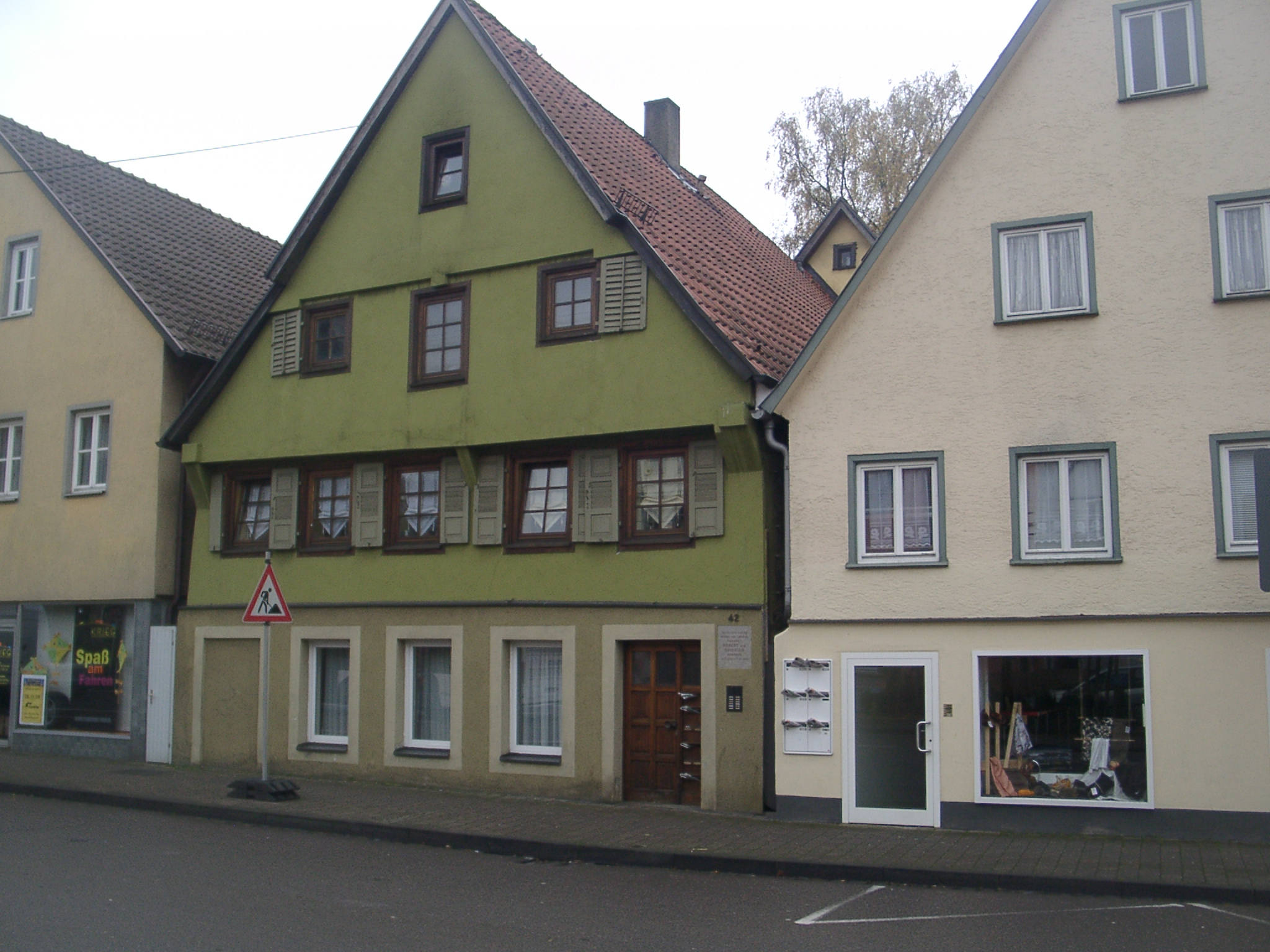 Vordere Schmiedgasse Schwäbisch Gmünd